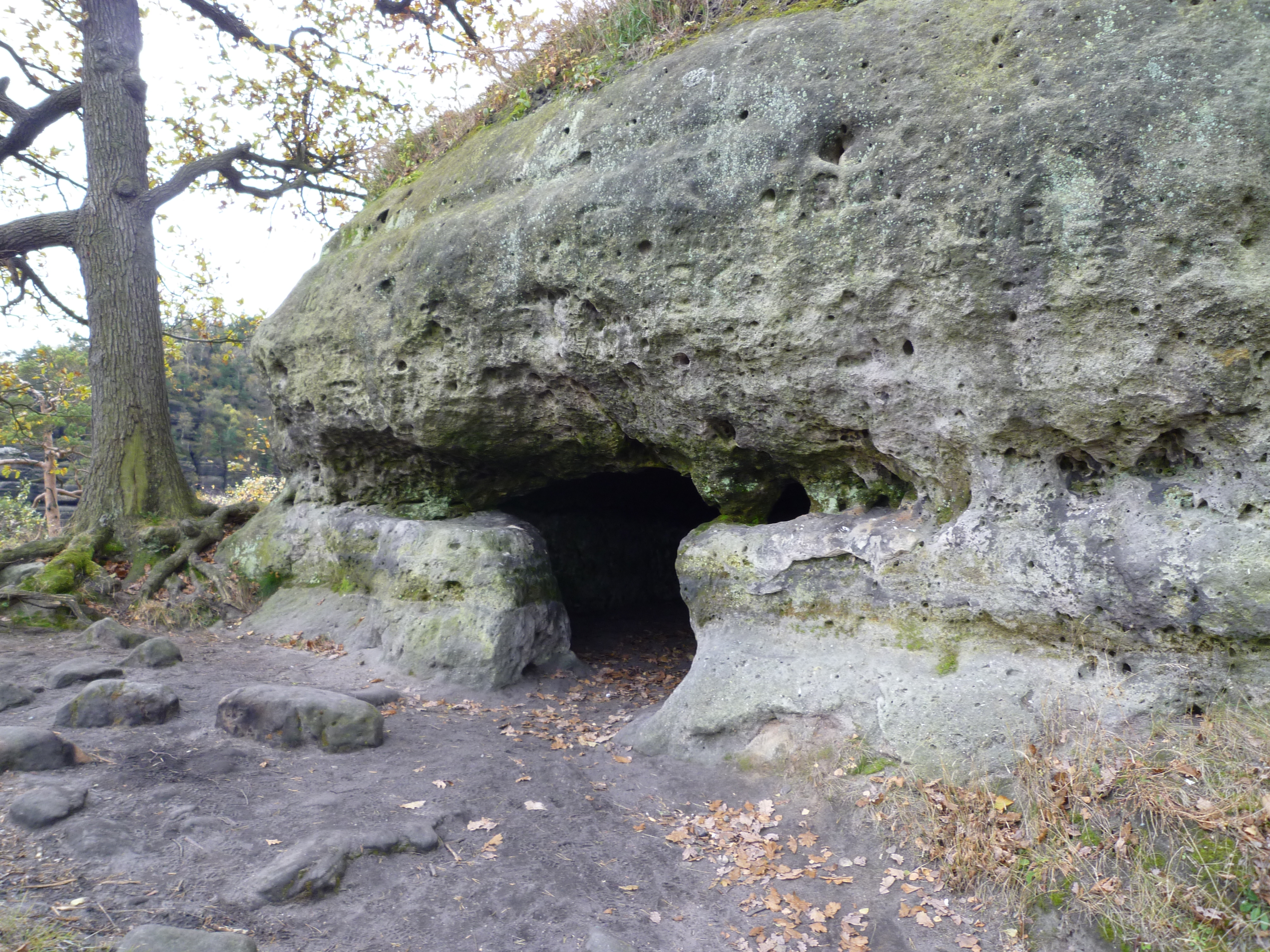 Sockel des ehemaligen Wohnturms mit Kellereingang